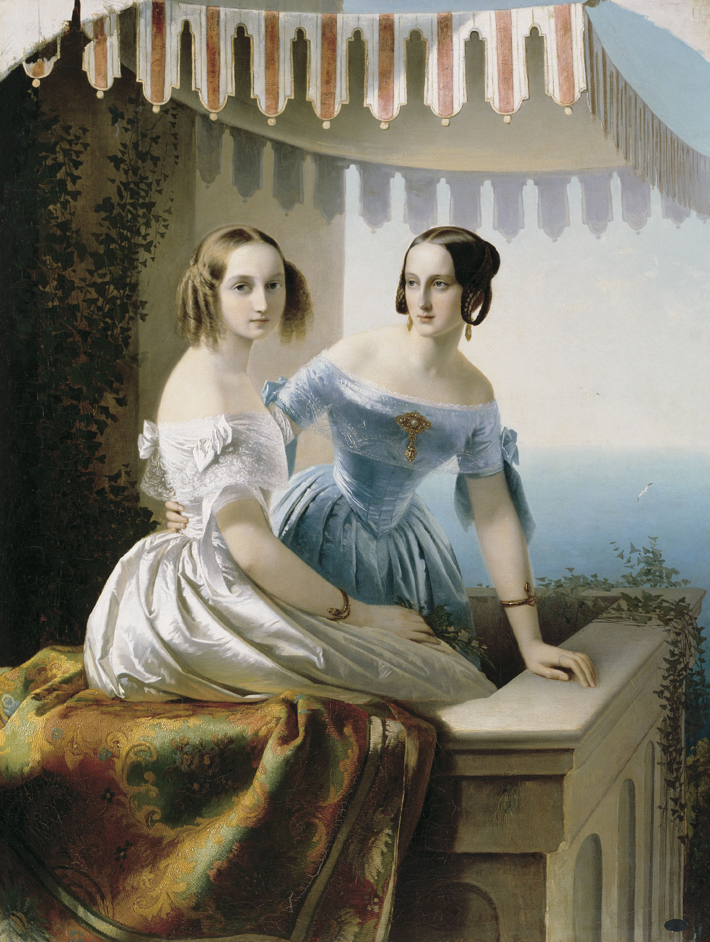 Grand princesses Mariya Nikolayevna and Olga Nikolayevna